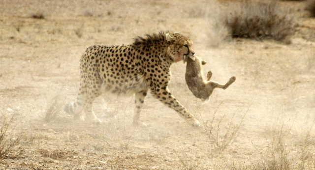 کوشکی پیروزمندانه از شکارخرگوش را بر می گردد